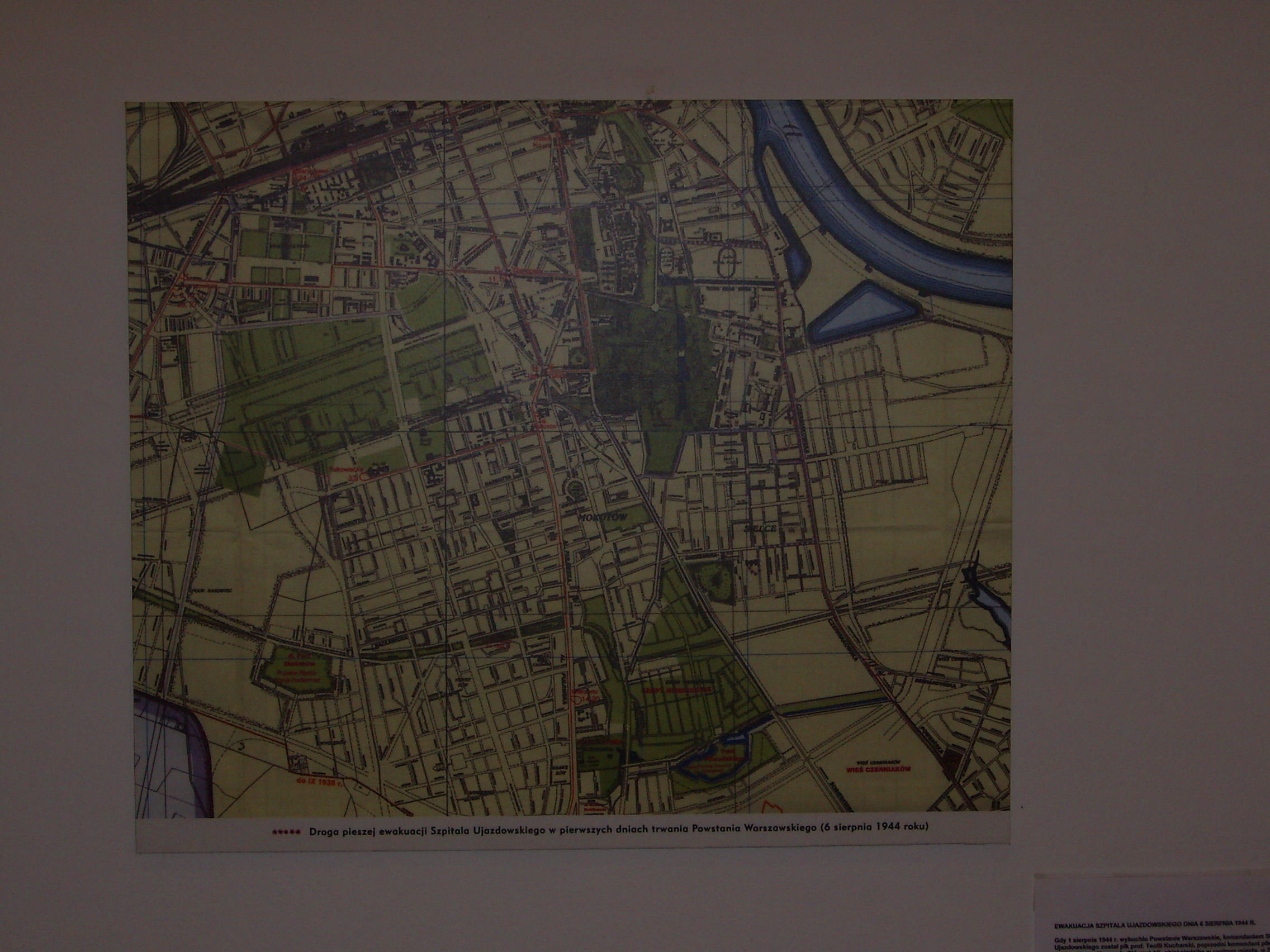 Muzeum Zamku i Szpitala Wojskowego na Ujazdowie - zdjęcie z wnętrza muzeum